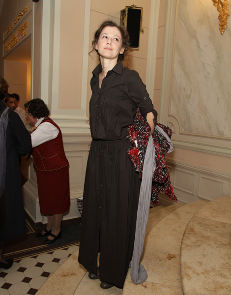 Фестиваль и премия «Золотая маска» 2012 года